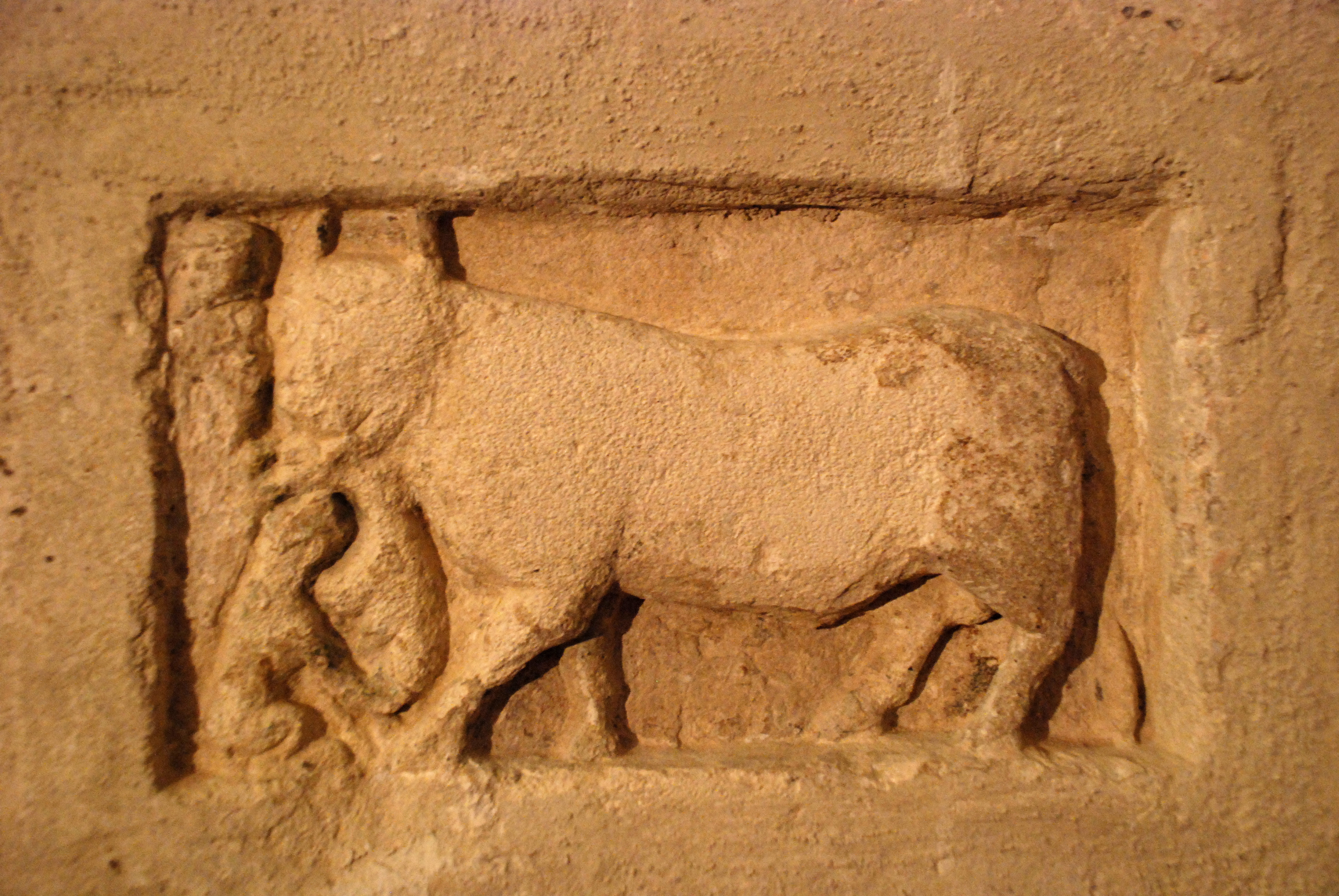 France - Provence - Alpes-de-Haute-Provence - Église de Saint-Martin-les-Eaux